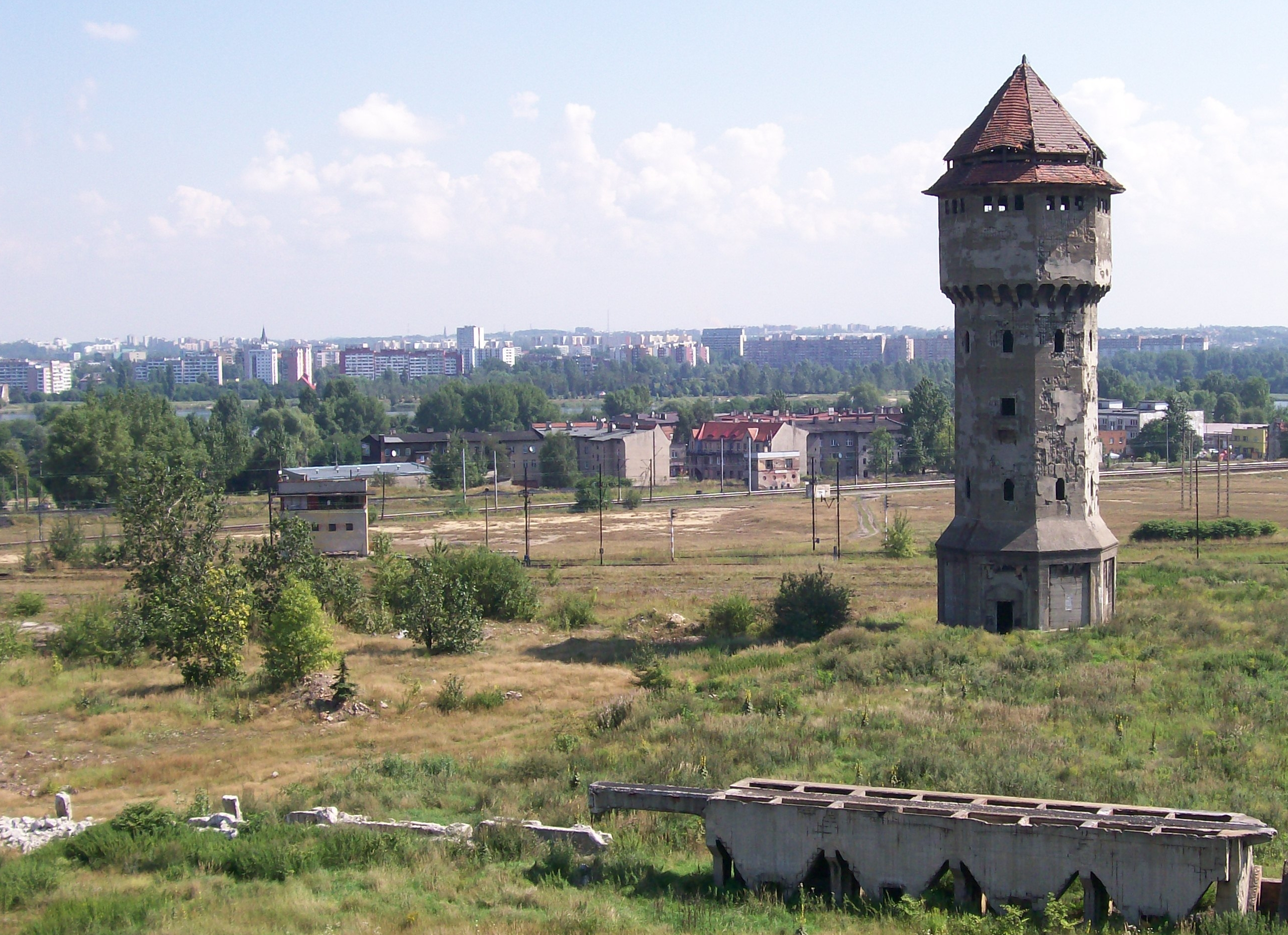 Katowice Szopienice - zespół zabudowy dawnej huty cynku (zabytek nr A/1227/78 z 30.07.1978)